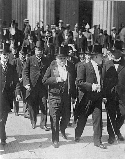 Ramón Barros Luco (* Santiago, Chile, 9 de junio de 1835 – † ibídem, 20 de septiembre de 1919) fue presidente de Chile.